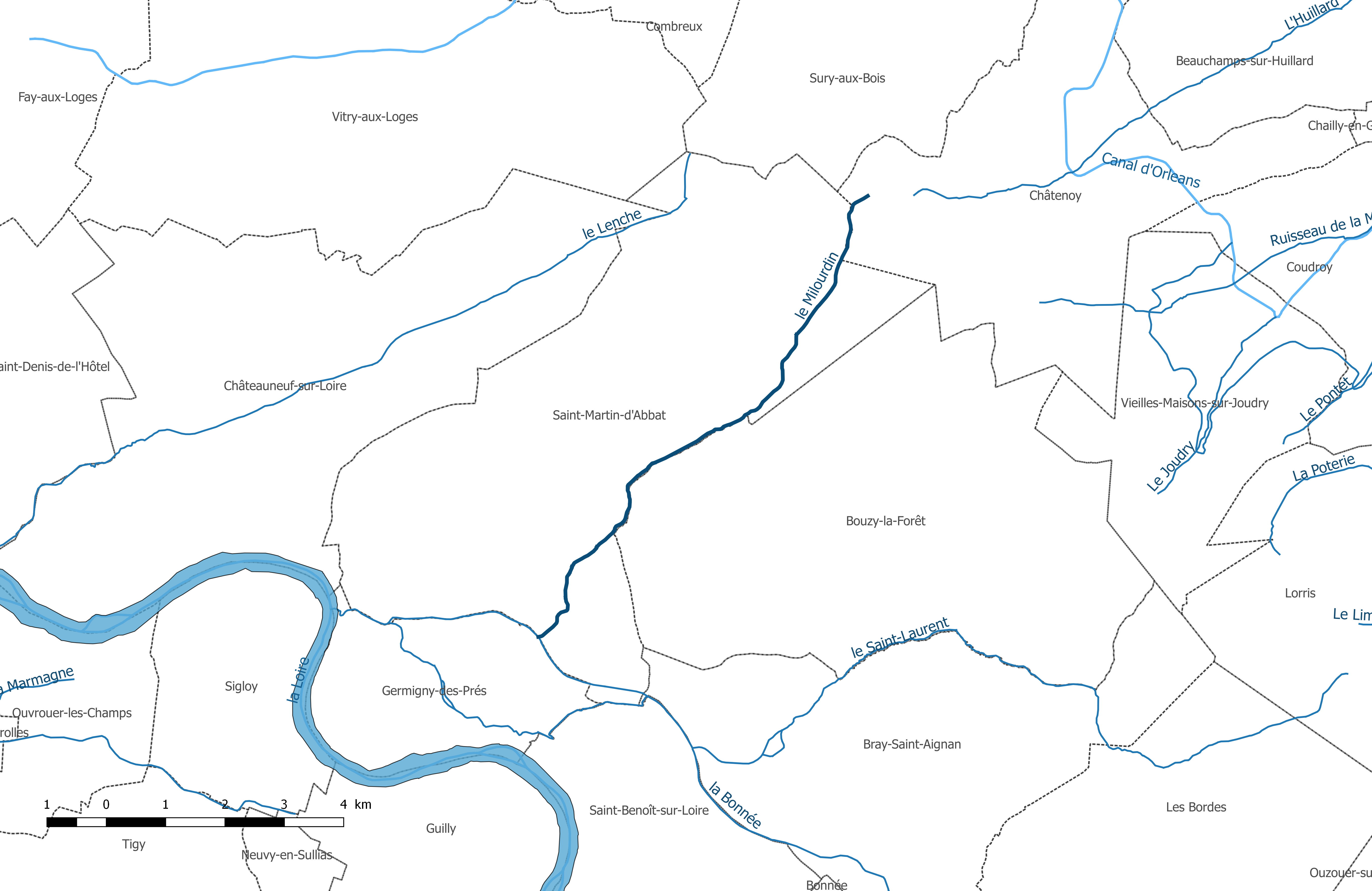 Carte du cours d'eau "le Milourdin" et de ses affluents, dans le département du Loiret.